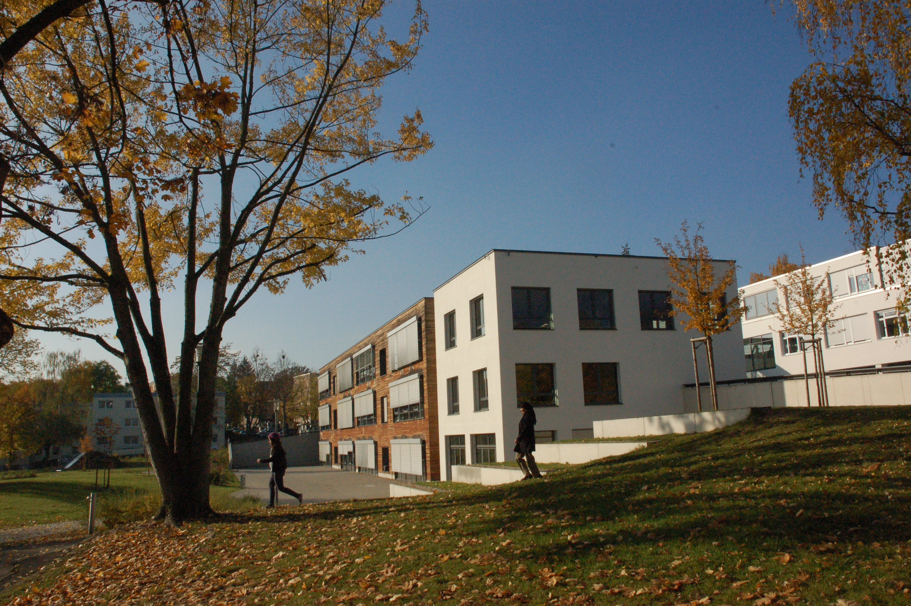 Joseph-von-Eichendorff-Schule, Grundschule in Schierstein-Nord mit Betreuung bis 16:30 Uhr